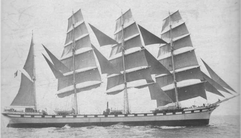 Die Viermastbark Caroline (II) (1895-1901) der Reederei Bordes, gebaut in Nantes (nicht zu verwechseln mit der EisenbarkCaroline I (1869) mit 680 BRT oder der Caroline III ex Muskoka (1891))